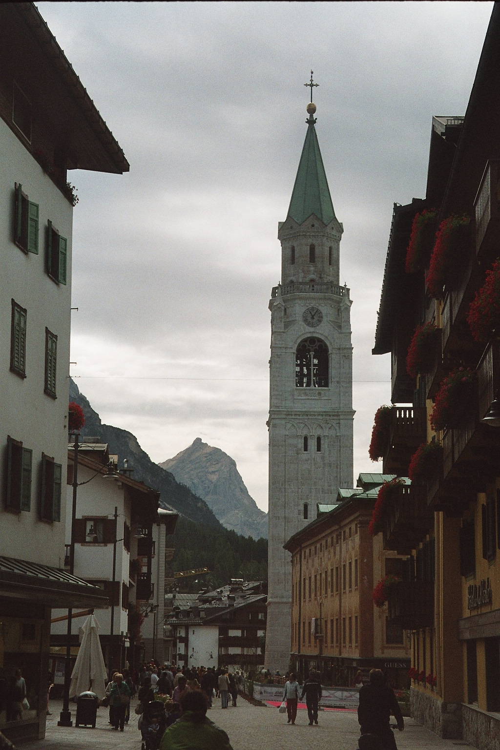 Campanile Cortina d'Ampezzo